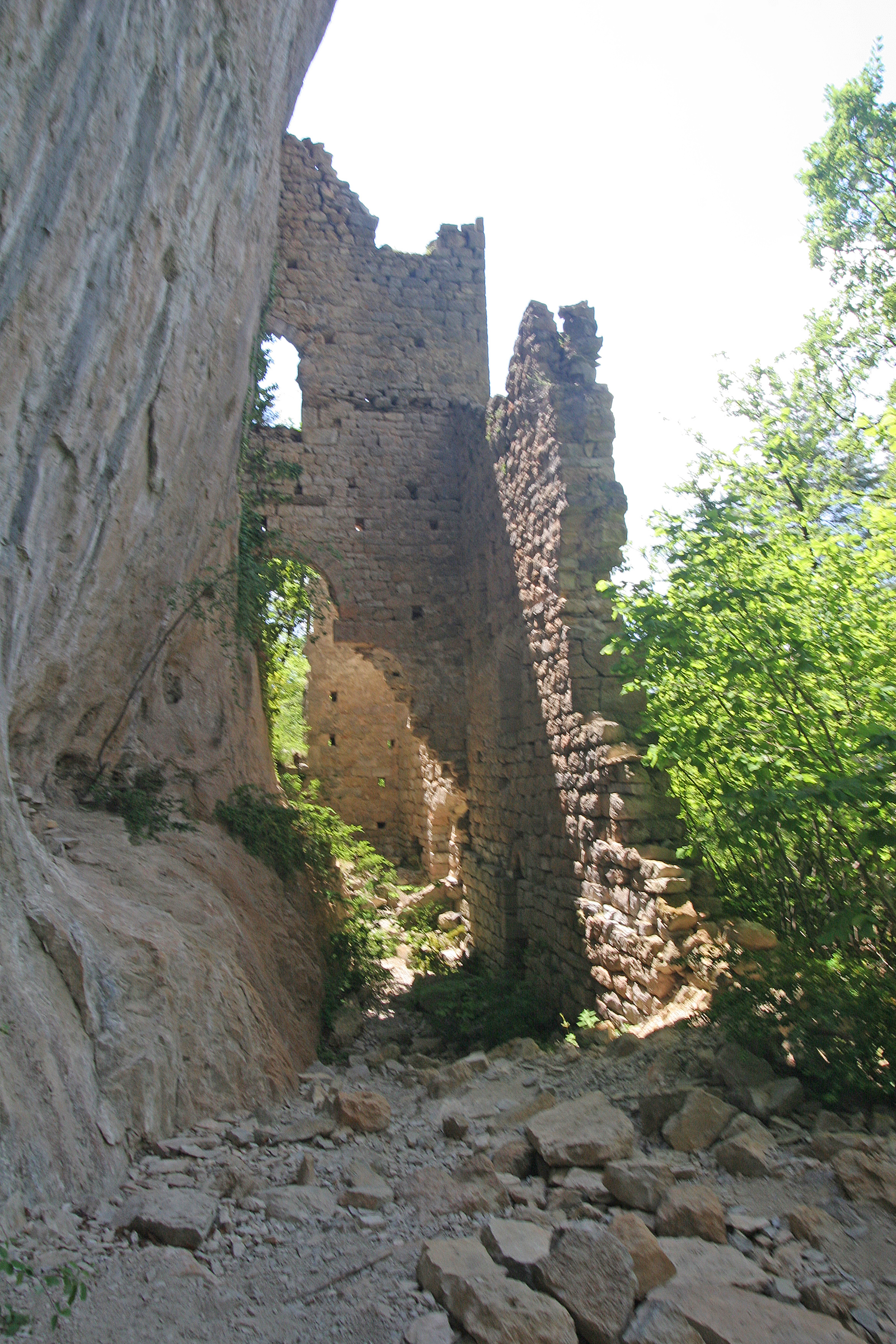 l'ermitage Saint Pons